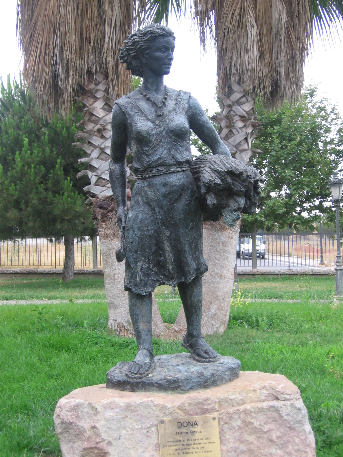 "Dona" de Jaume Cases